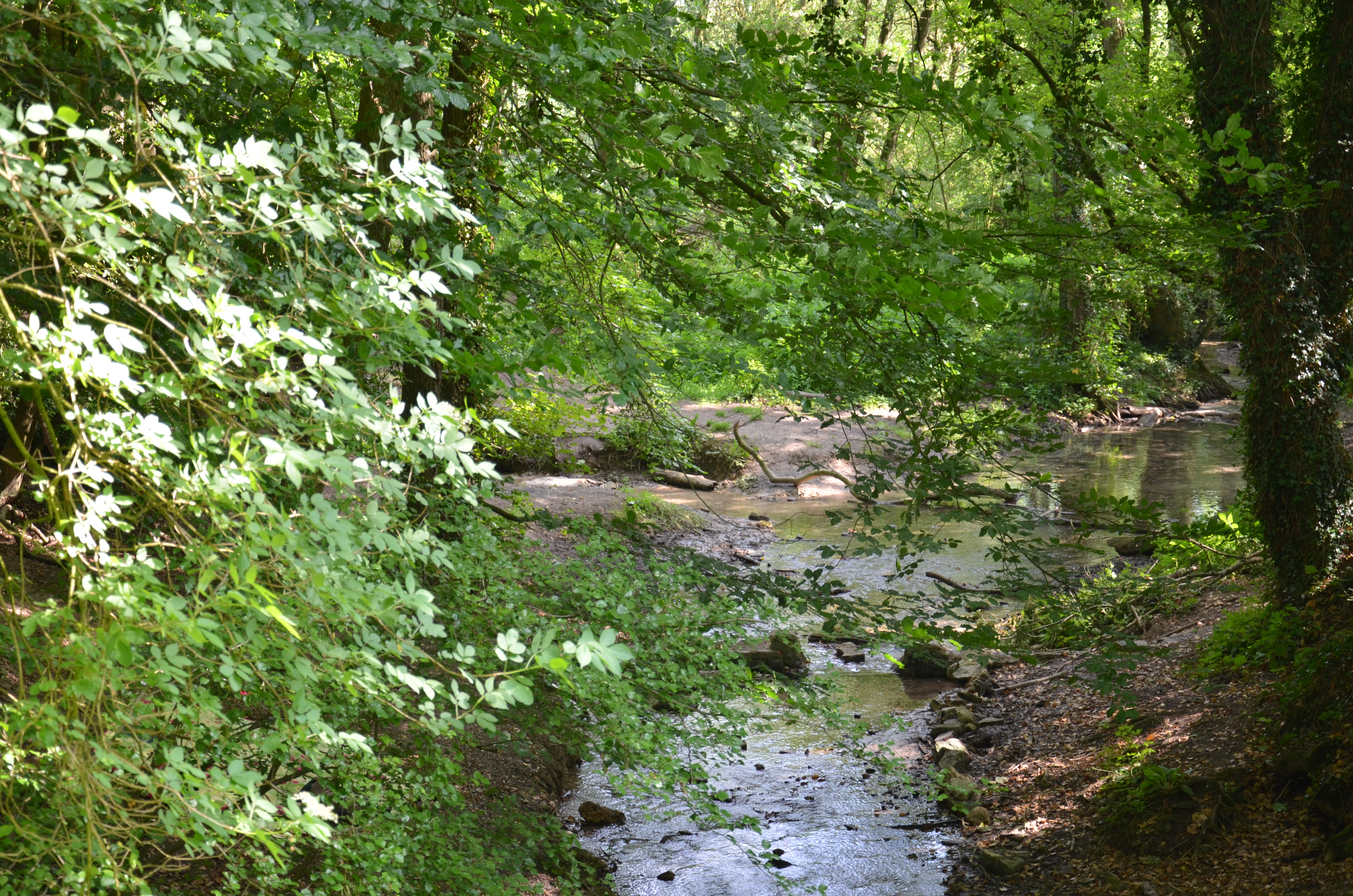 Oberlauf der Stever hier eine der Grundquellen (Grundwasseraustritt unterhalb der Wasserspiegellinie), die Wassermenge erhöht sich deutlich